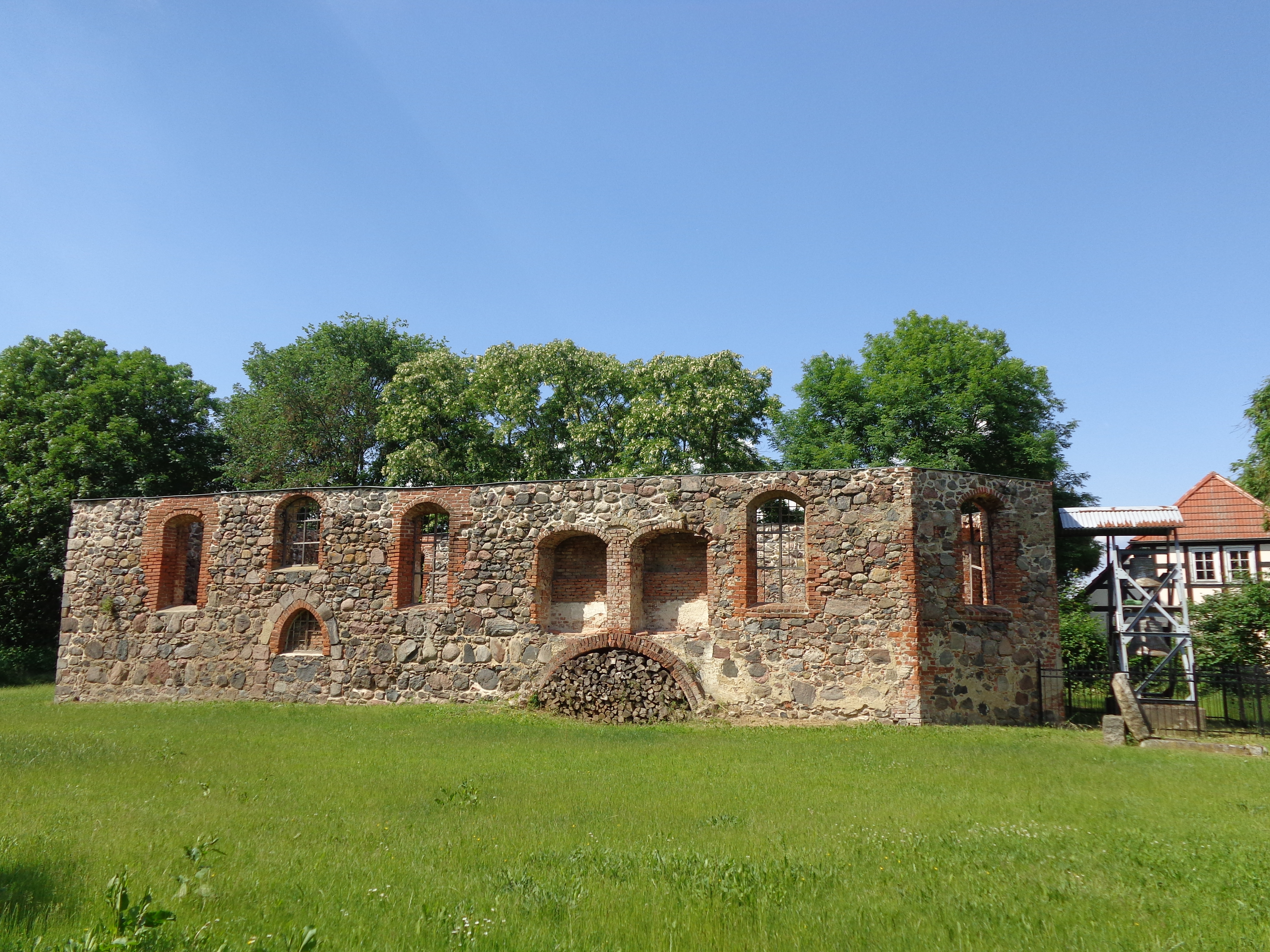 Kirchenruine Ganzer, Blick von Süden, Ganzer, Ortsteil der Gemeinde Wusterhausen/Dosse, Lkr. Ostprignitz-Ruppin, Brandenburg